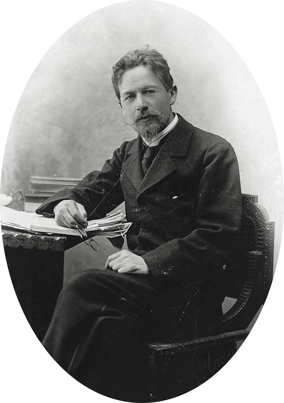 Anton Pavlovich Chekov (1860-1904)